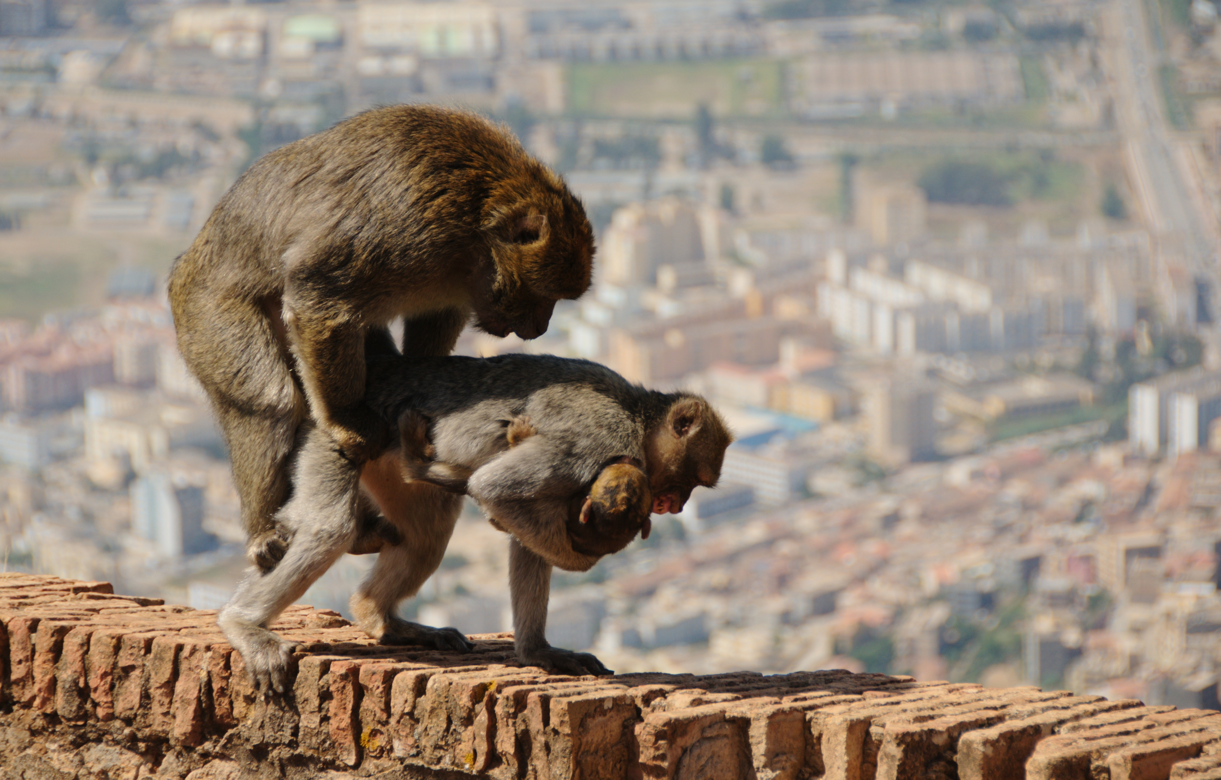 Magot male dans une attitude domination face à une femelle et son petit à Yemma Gouraya, Béjaïa